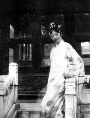 婉容